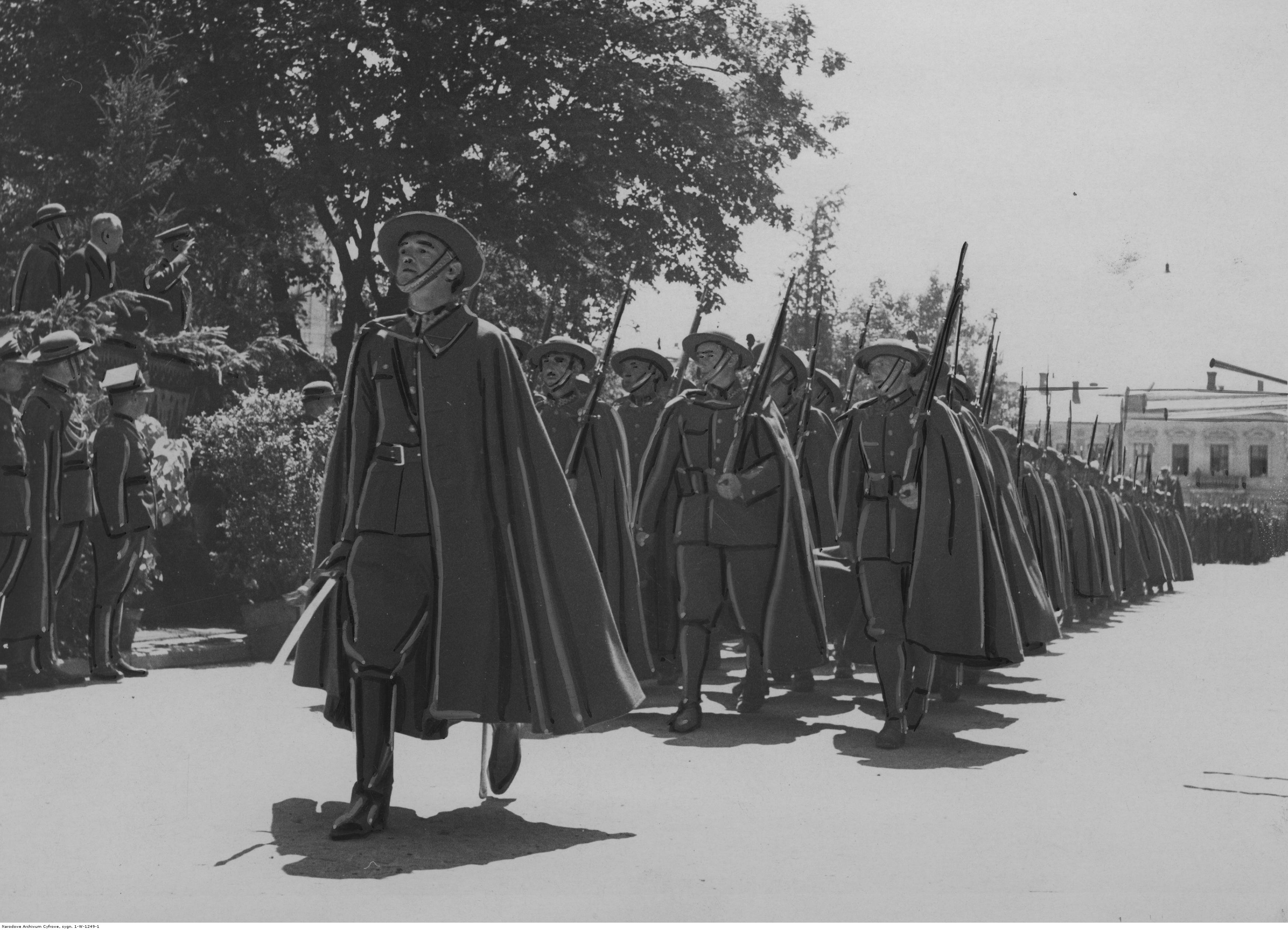 Święto 49 pułku piechoty w Kołomyi - oddział huculski podczas defilady; sierpień 1938 r. Koncern Ilustrowany Kurier Codzienny - Archiwum Ilustracji. Sygnatura: 1-W-1249-1